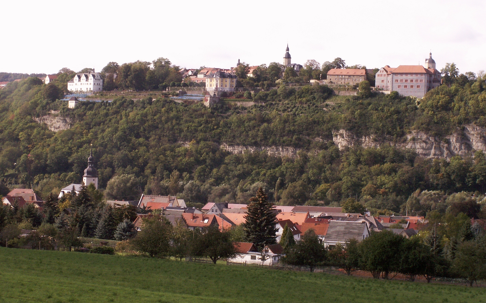 Dornburg an der Saale mit Dorndorf im Vordergrund Foto 2006 Wolfgang Pehlemann Wiesbaden PICT0114